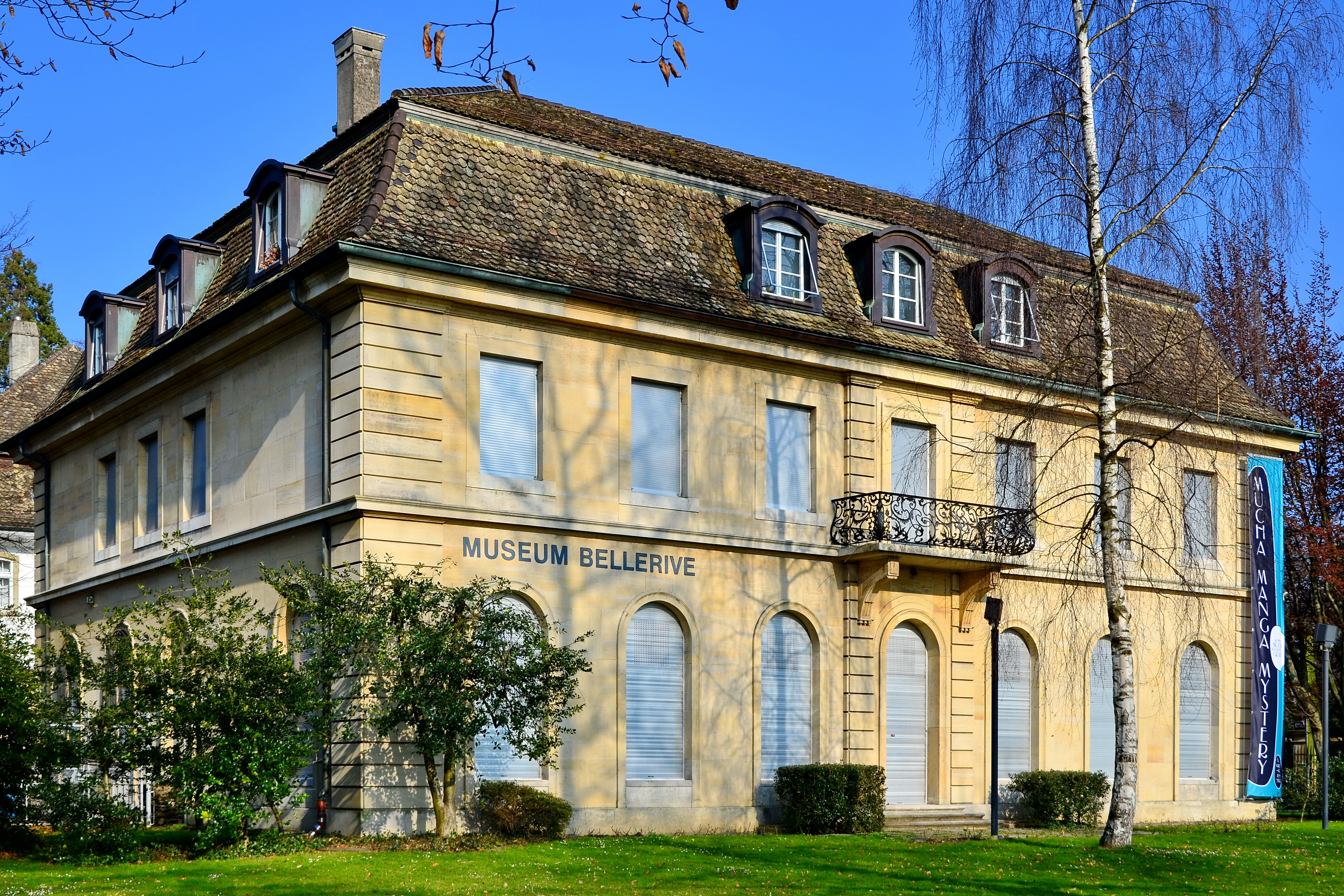 Museum Bellerive, Seefeldquai in Zürich-Seefeld (Switzerland)